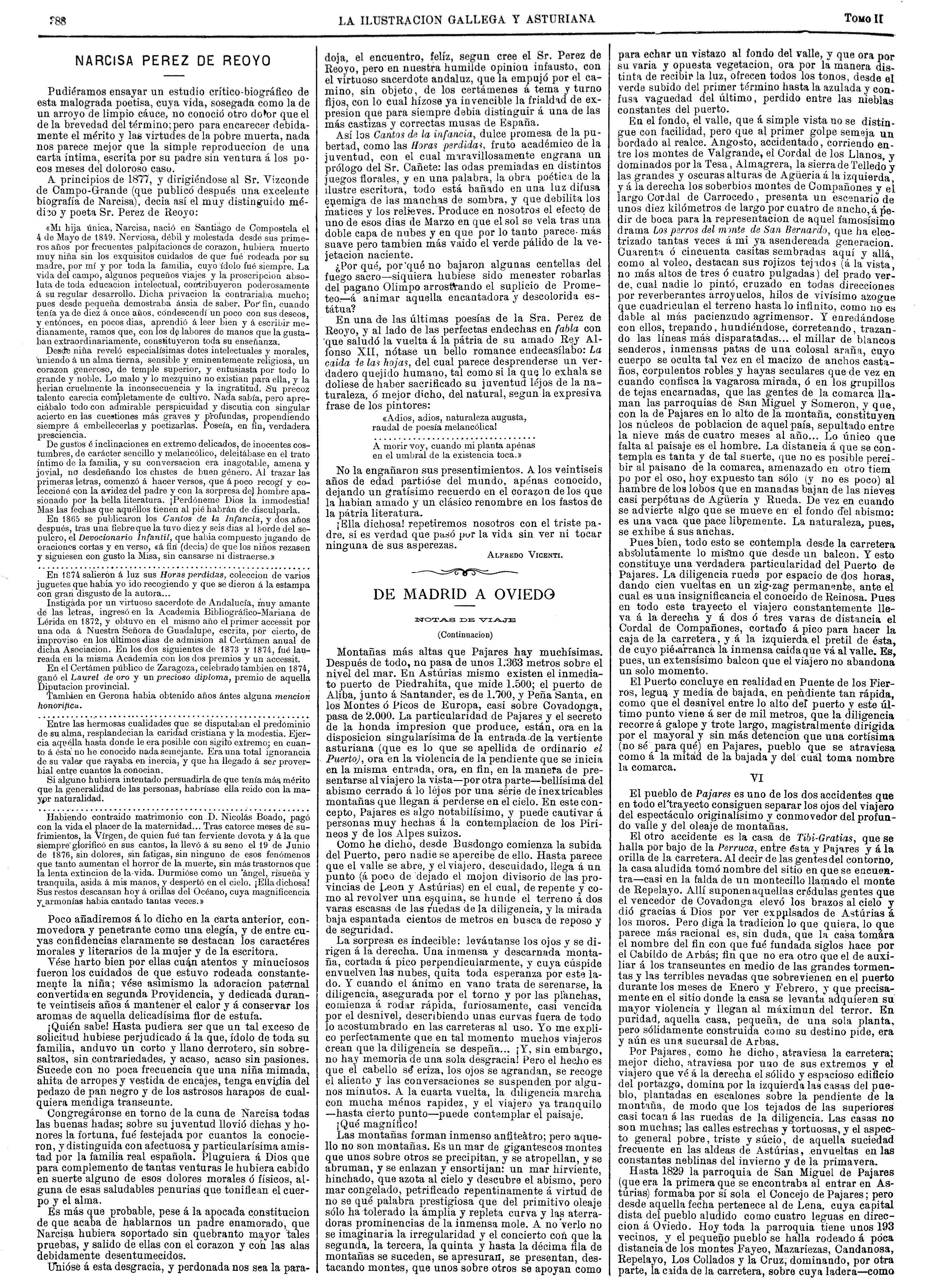 La Ilustración Gallega y Asturiana n.º 31, 8 de noviembre de 1880, página 388.